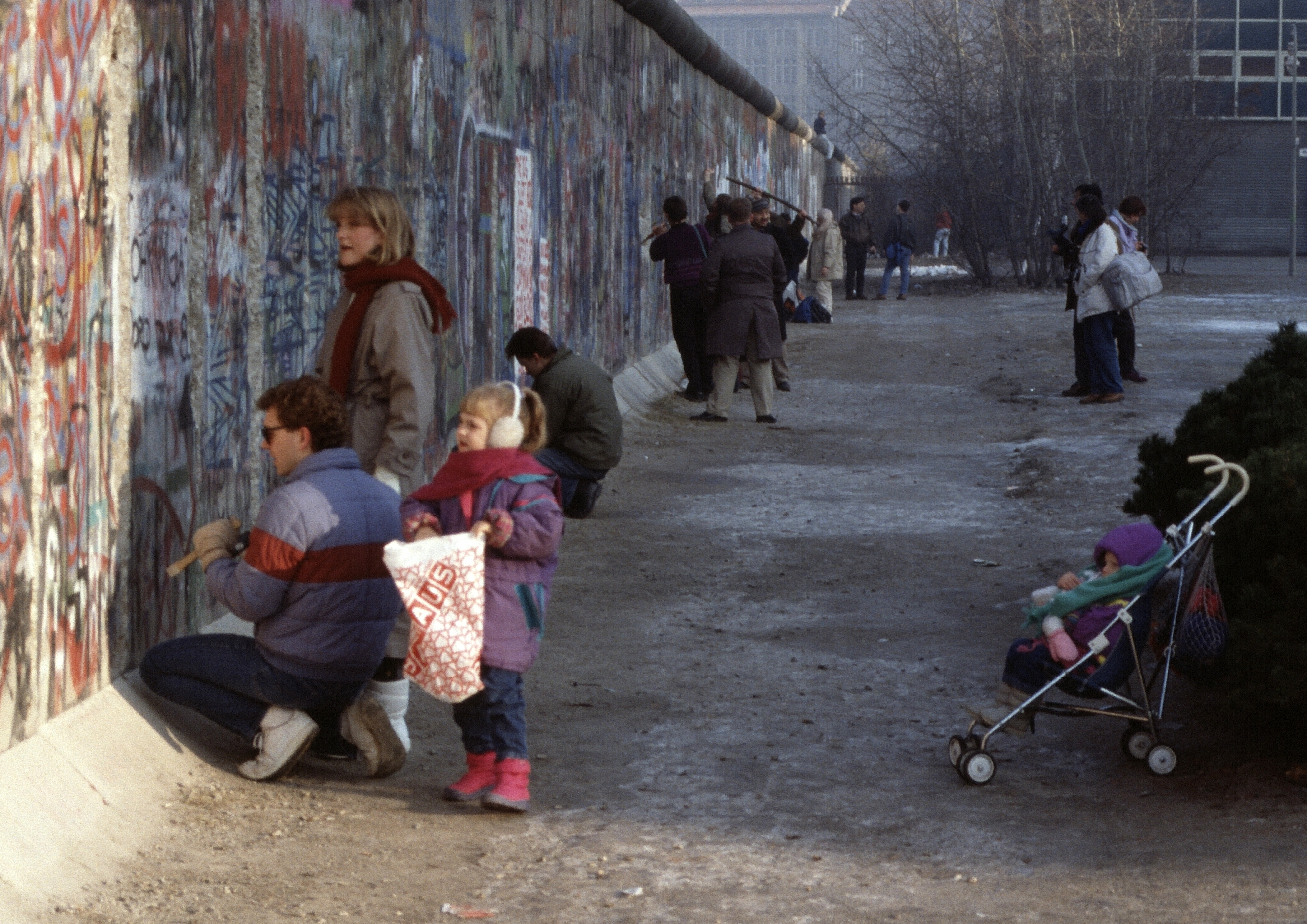 Mauerspechte an der Berliner Mauer